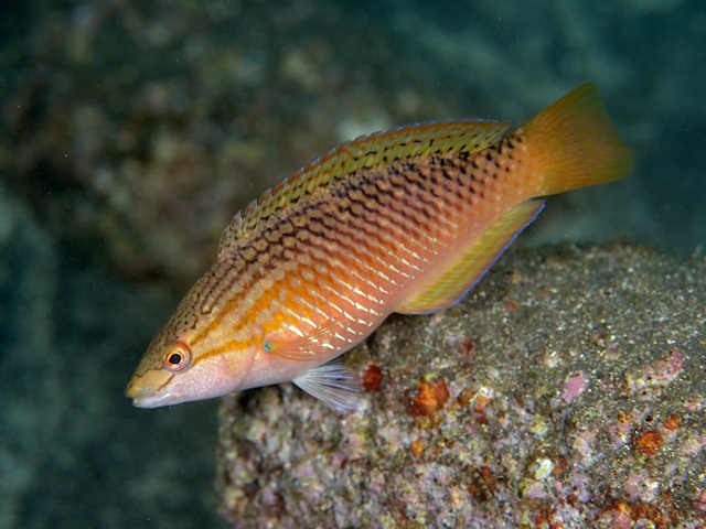 アカササノハベラ Pseudolabrus eoethinus